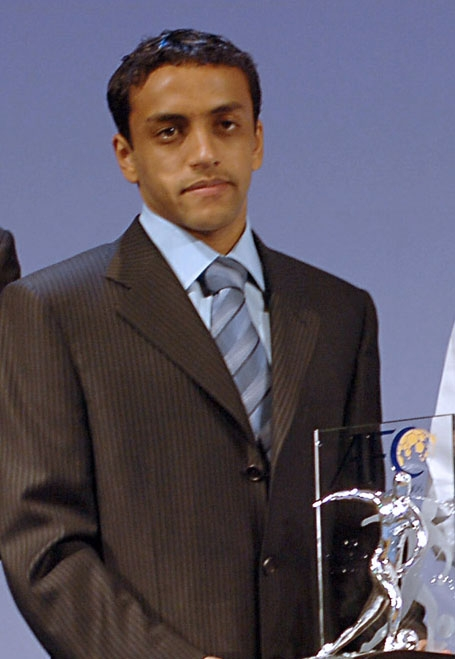 Mohammad asch-Schalhub.